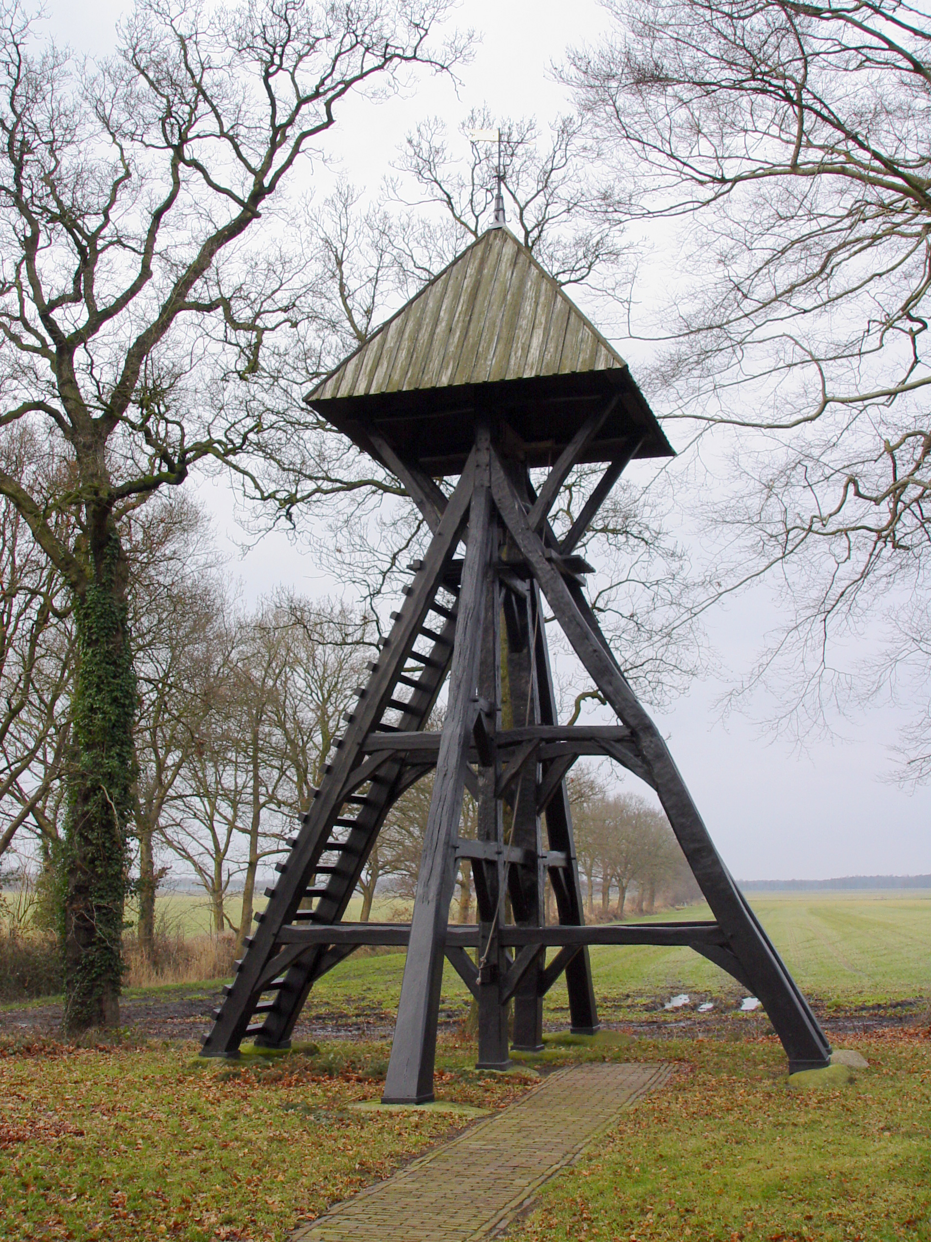 Boijl, Boijlerweg 87 - Dorpskerk - Anno 1617 - Klokkenstoel -Anno - 1600